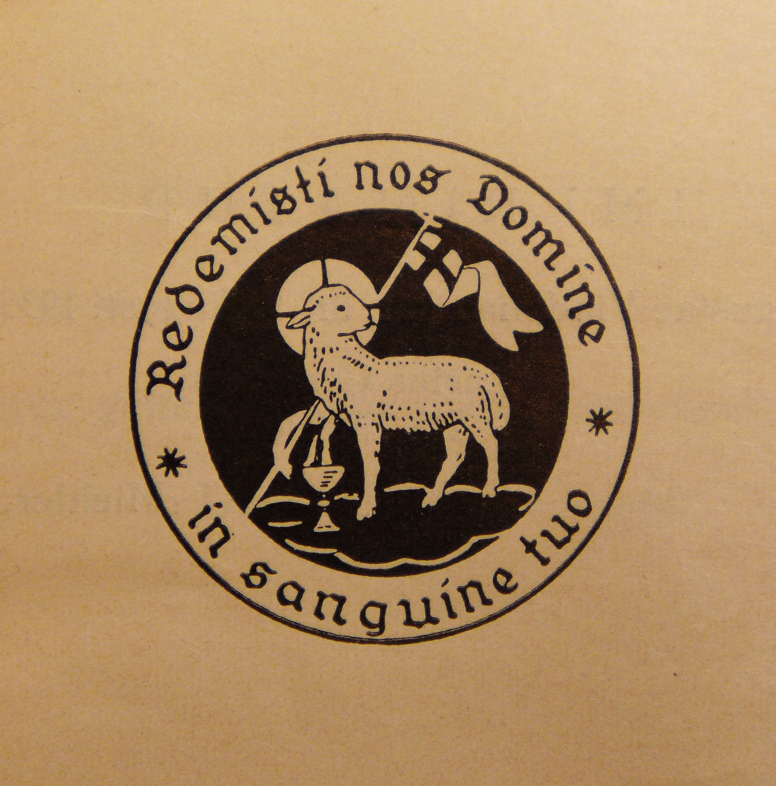 Siegel der Missionsschwestern vom kostbaren Blut mit der lateinischen Inschrift "Redemisti nos Domine in sanguine tuo.", dt. Übersetzung: "Herr, Du hast uns durch Dein Blut freigekauft."; nach Template:Bibel